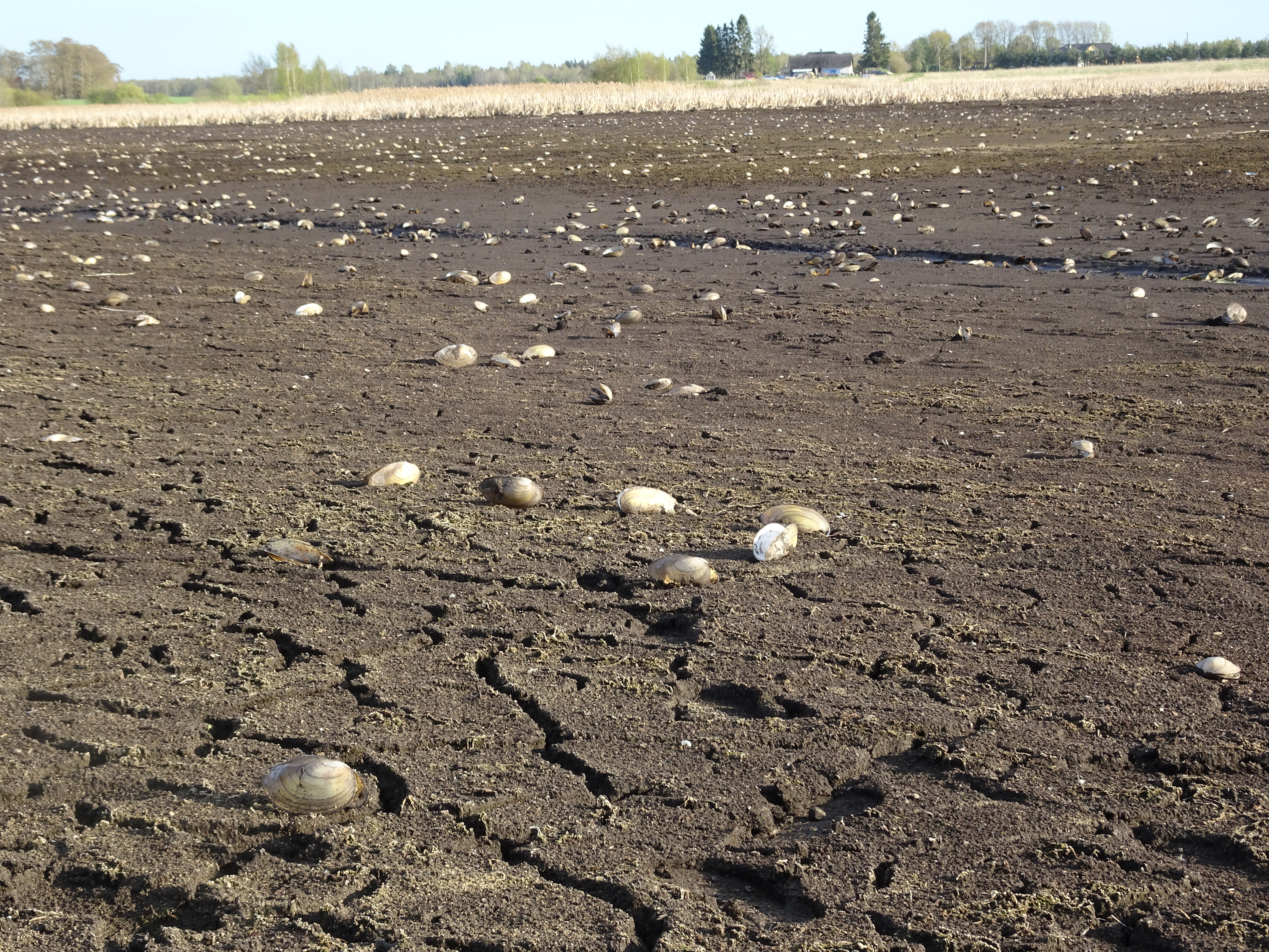 Järvekarpide kojad Ilmatsalu kalatiigi põhjas